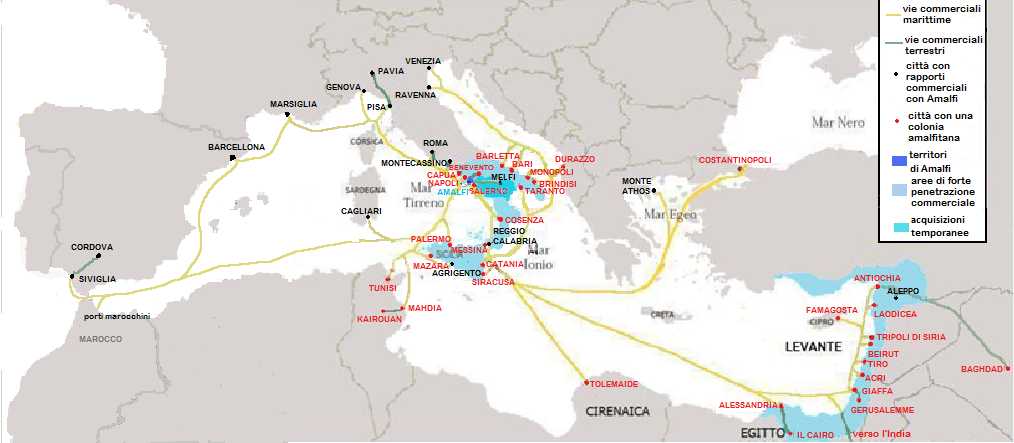 Cartina indicante le vie commerciali, le colonie e i territori della repubblica marinara di Amalfi al suo apogeo.